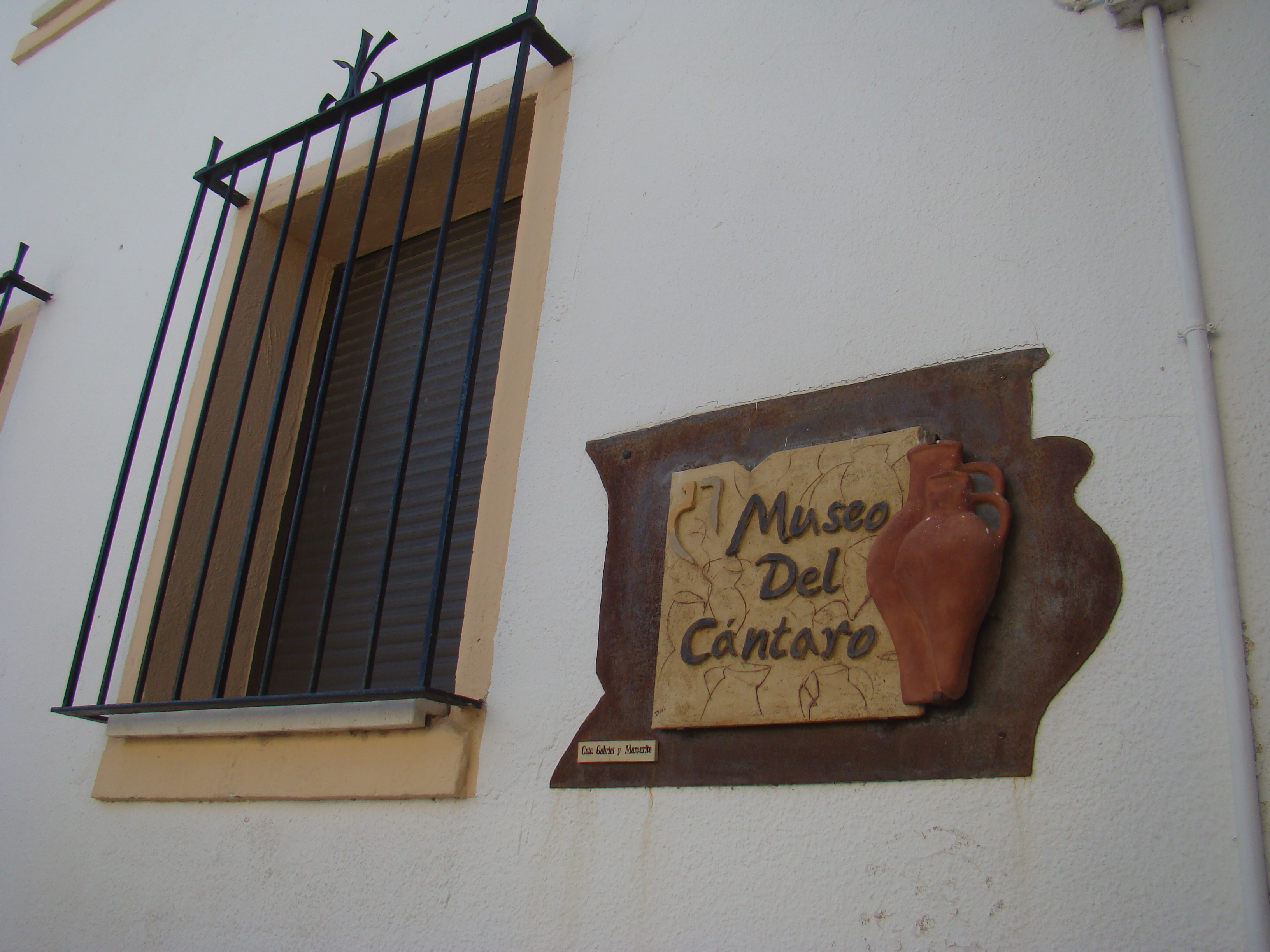 Localidad de Valoria la Buena en la provincia de Valladolid, España. Entrada al Museo del cántaro.